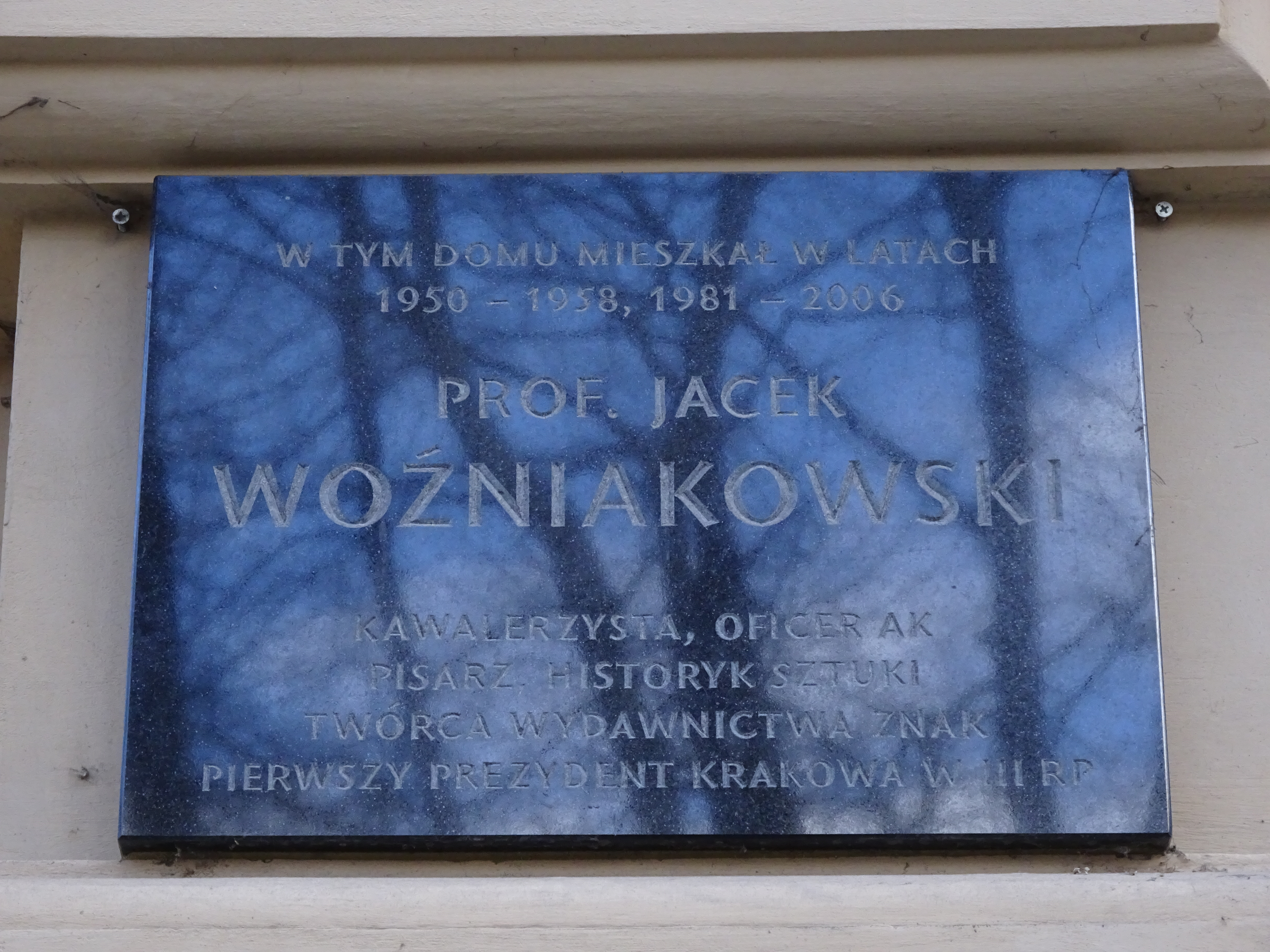 Ulica Pijarska 5 - tablica upamiętniająca zamieszkiwanie owej kamienicy przez Jacka Woźniakowskiego w latach 1950-1958 i 1981-2006. Kraków, 2017.